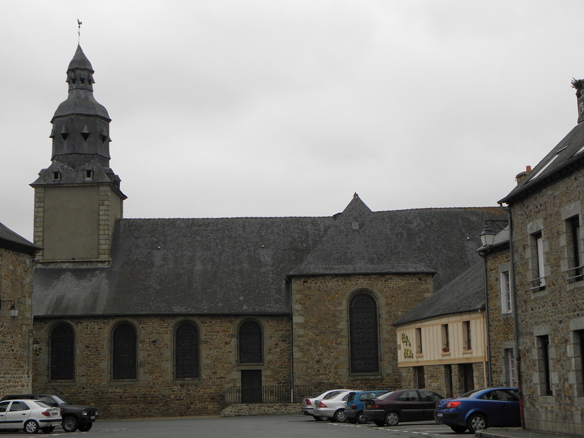 Flanc sud de l'église Saint-Magloire de Châtelaudren (22).*/98